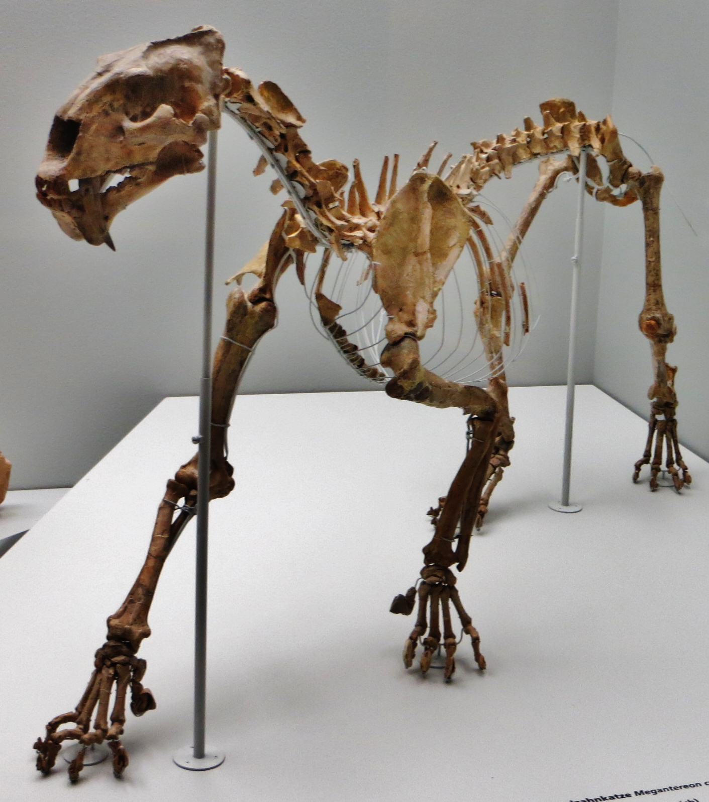 Fossil of Megantereon - Took the picture at Natural History Museum, Basel